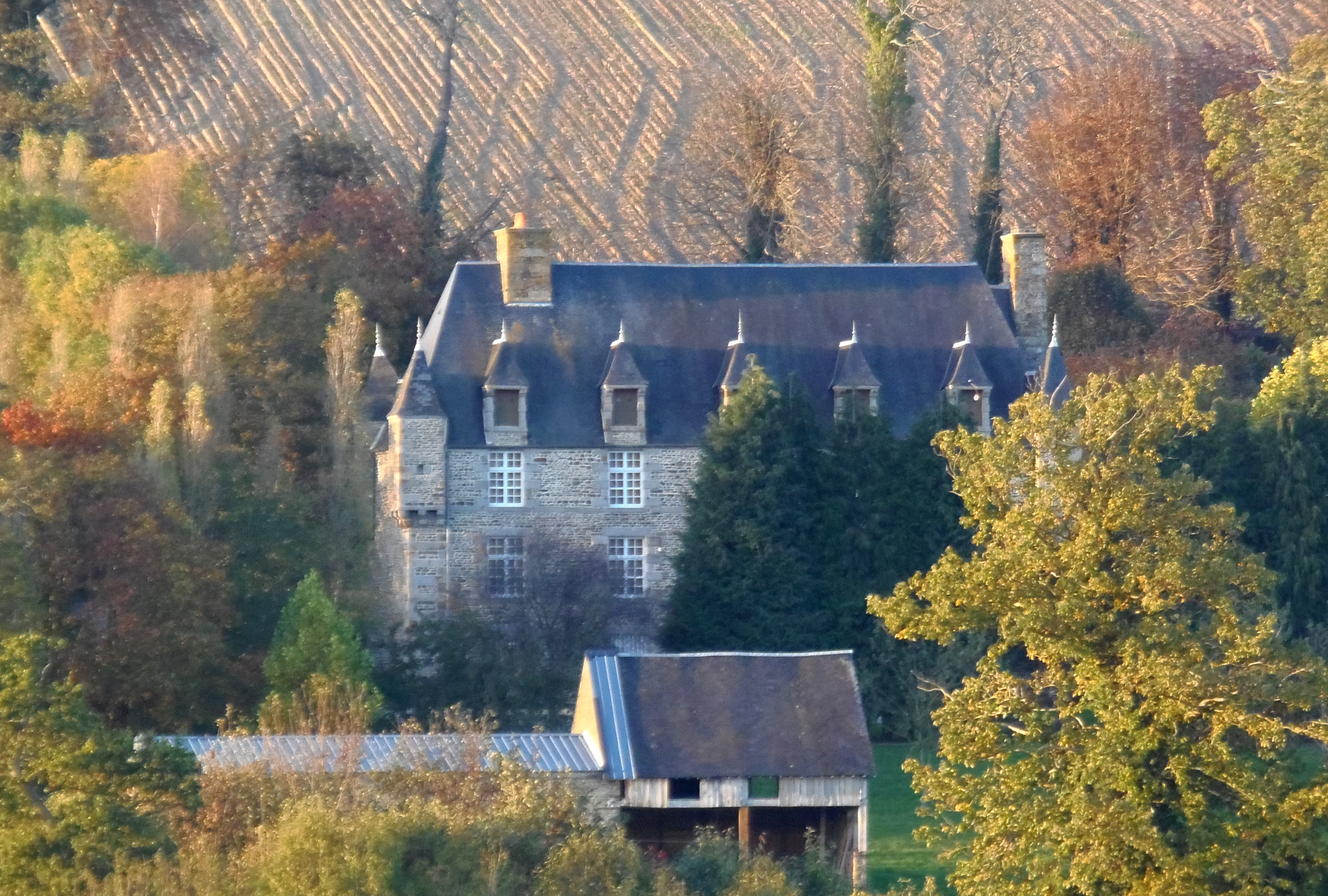 Burcy (Normandie, France). Le manoir du Bosq.